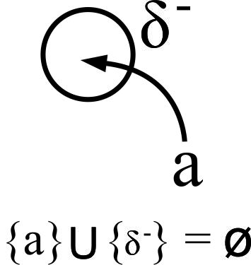 O conceito de "cair em um buraco".